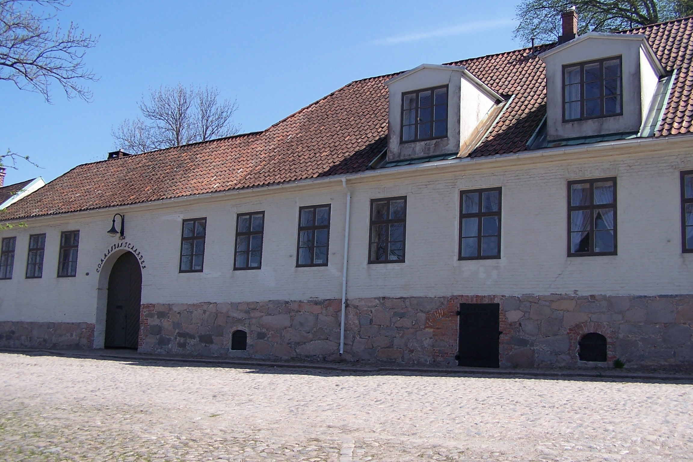 Commandantgaarden (Commandant's House) at Fredrikstad Fortress, Fredrikstad, Norway